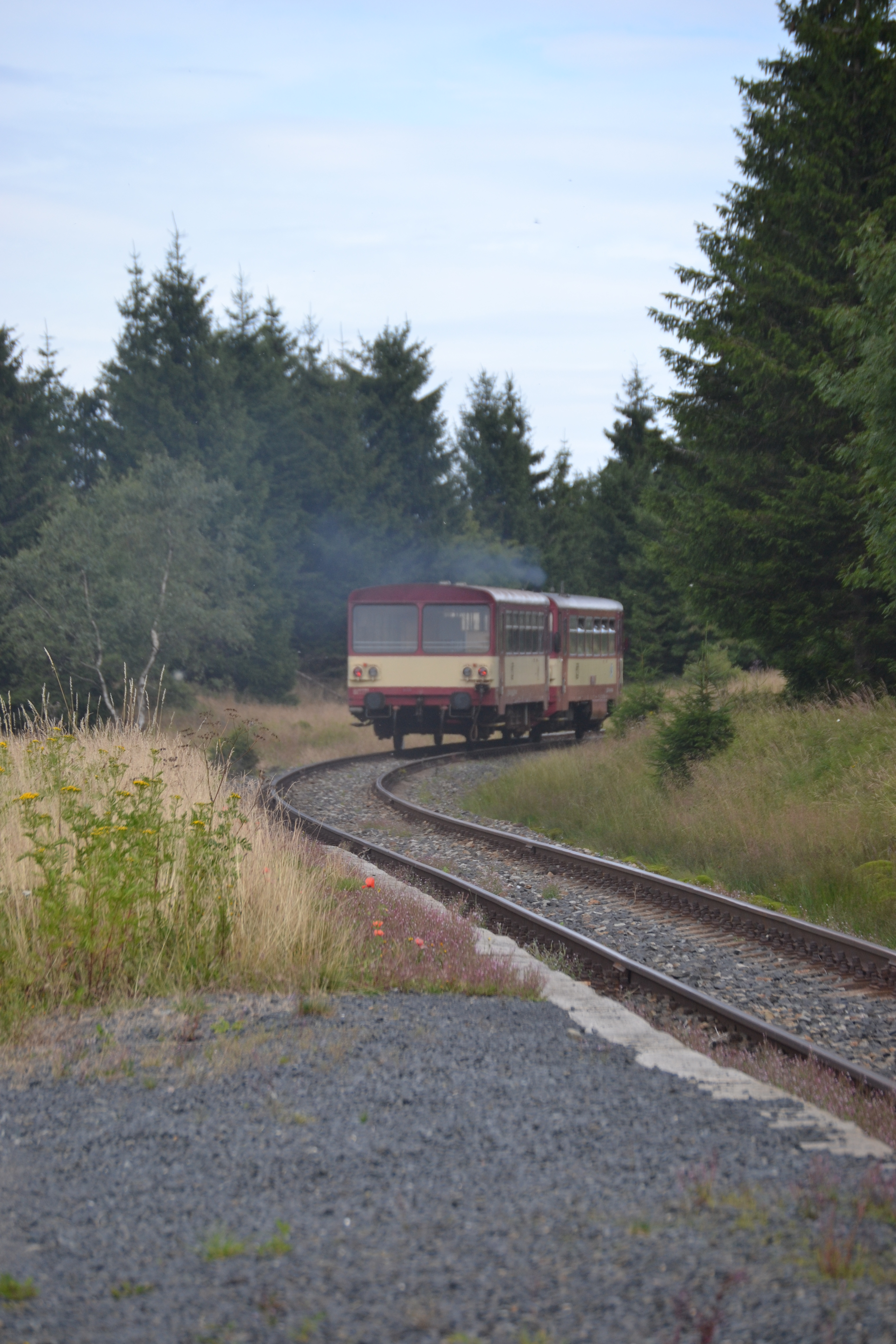 Triebwagenzug der CSD nach Chomutov auf der Bahnstrecke Chomutov–Vejprty/Reitzenhain an der Haltstelle Kovářská městys, Blick Richtung Chomutov.